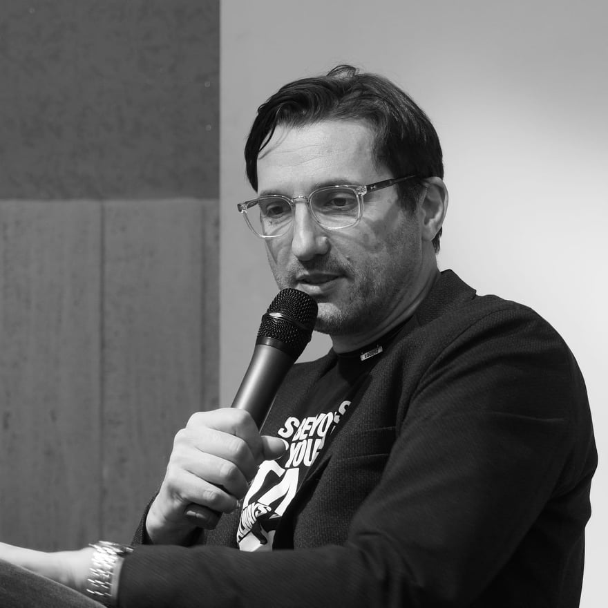 Immagine di Romano De Marco